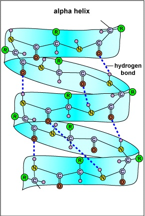 StrukturaSekondare